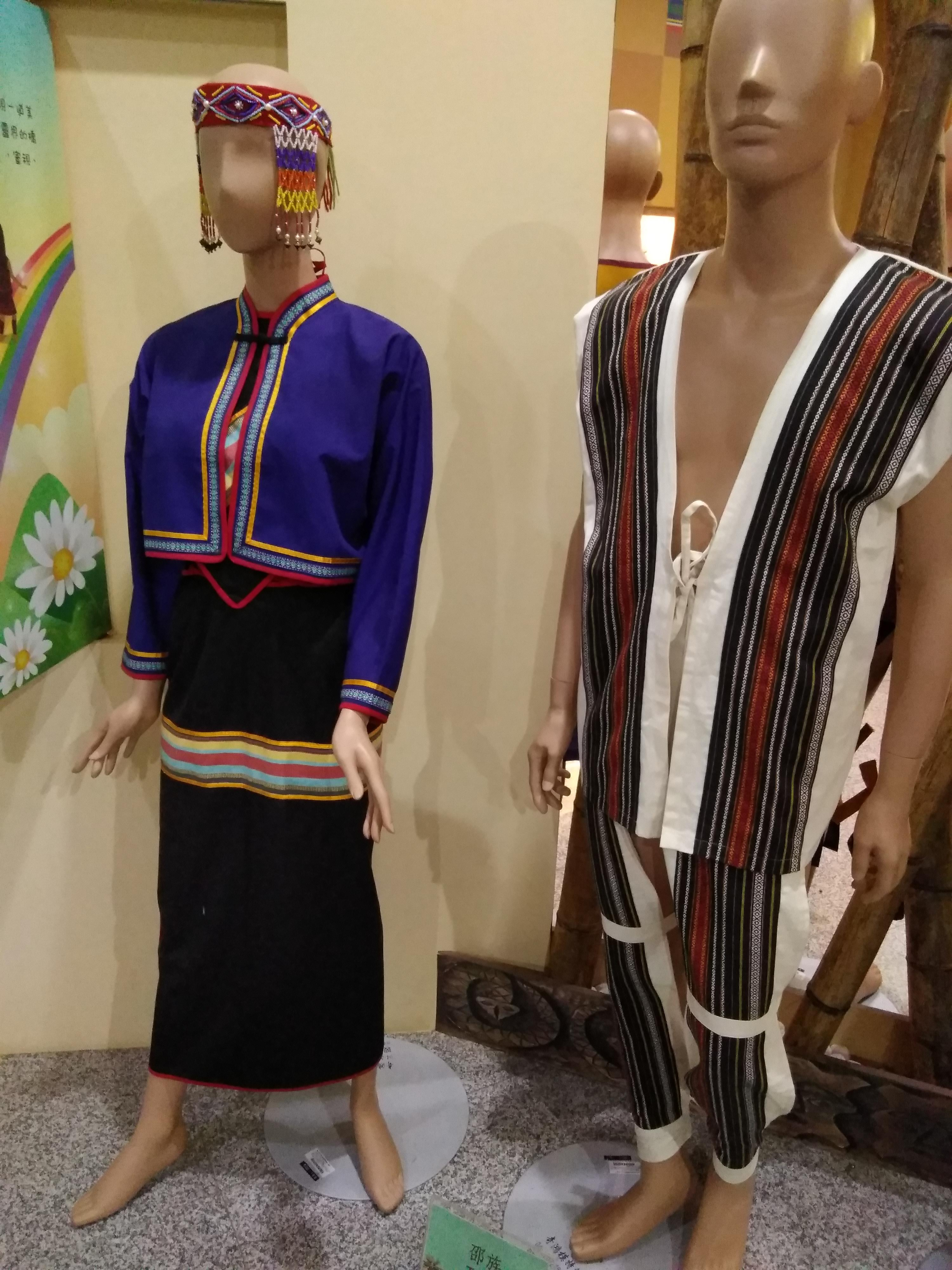 中文（台灣）: 台灣原住民服飾，邵族